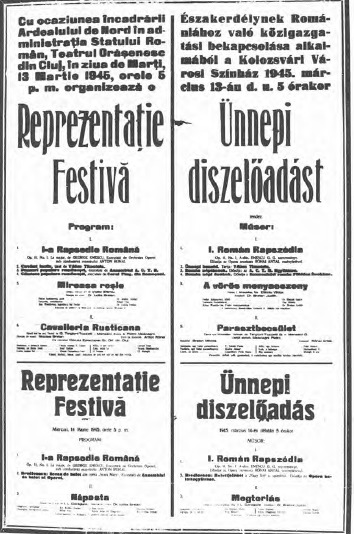 Az 1945. március 13-án Kolozsváron tartott díszelőadás plakátja